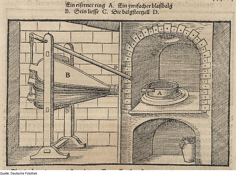 Original image description from the Deutsche Fotothek Bergwerk & Bergbau & Metallurgie & Probierofen & Blasebalg